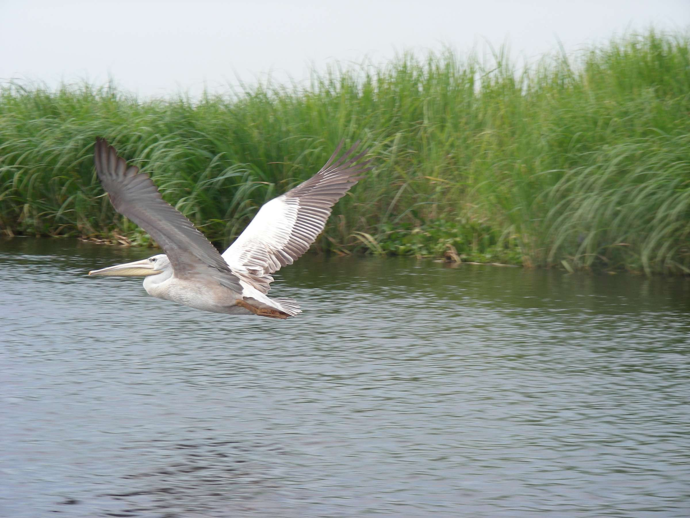 Nilo